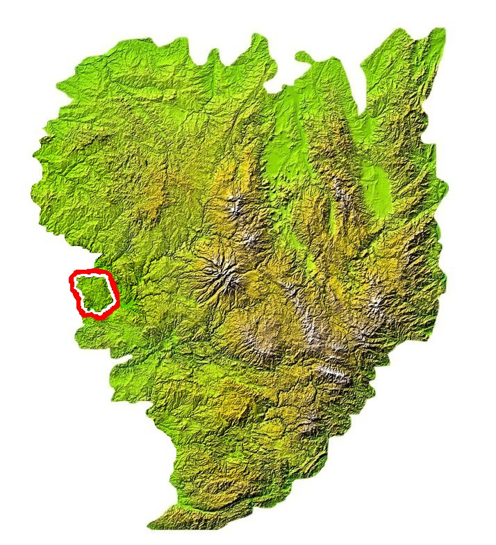 Localisation du Causse de Martel sur la carte du Massif central